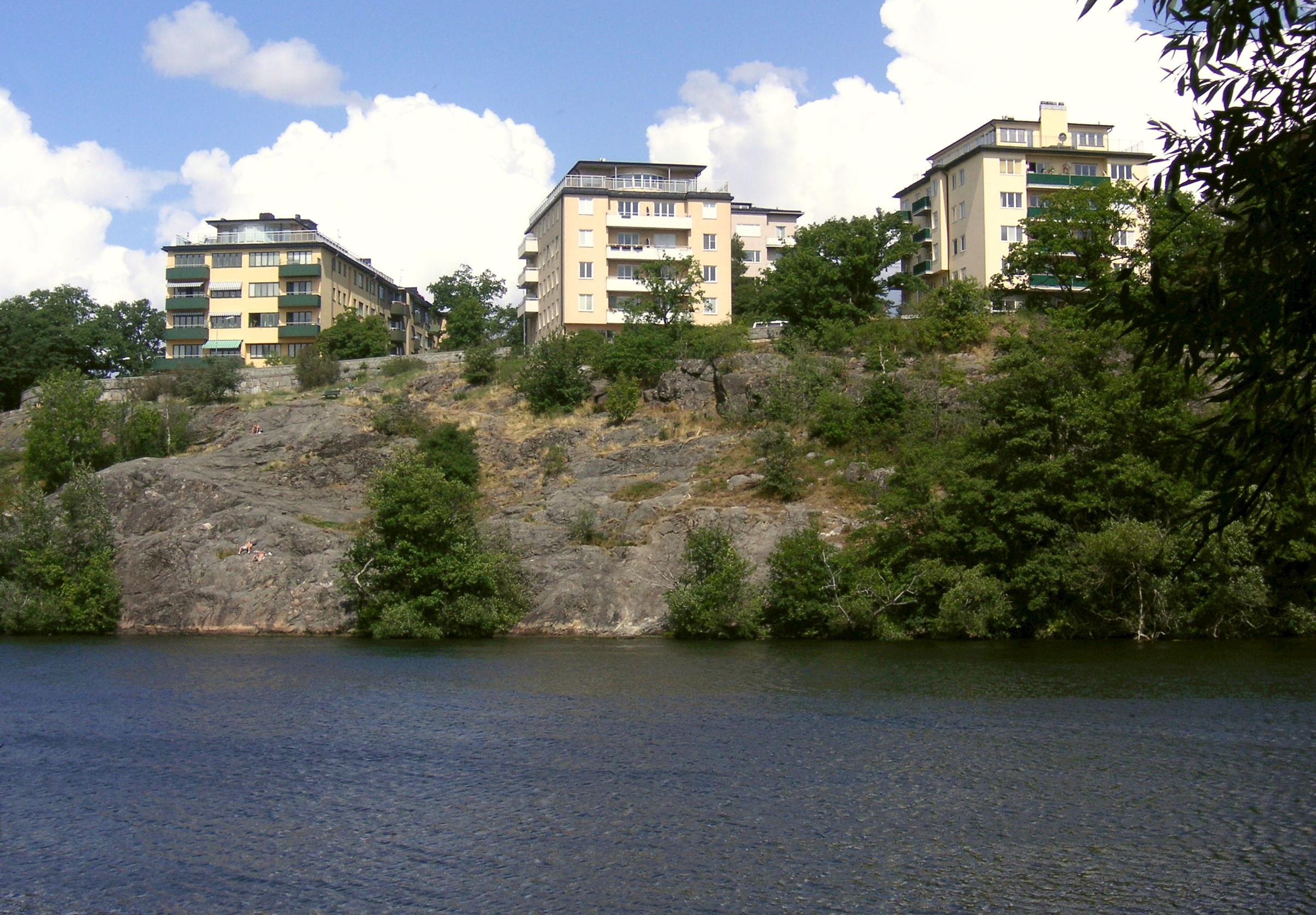 Marieberssundet i Stockholm, vy mot norr. Klipporna är en del av Fredhällsparken